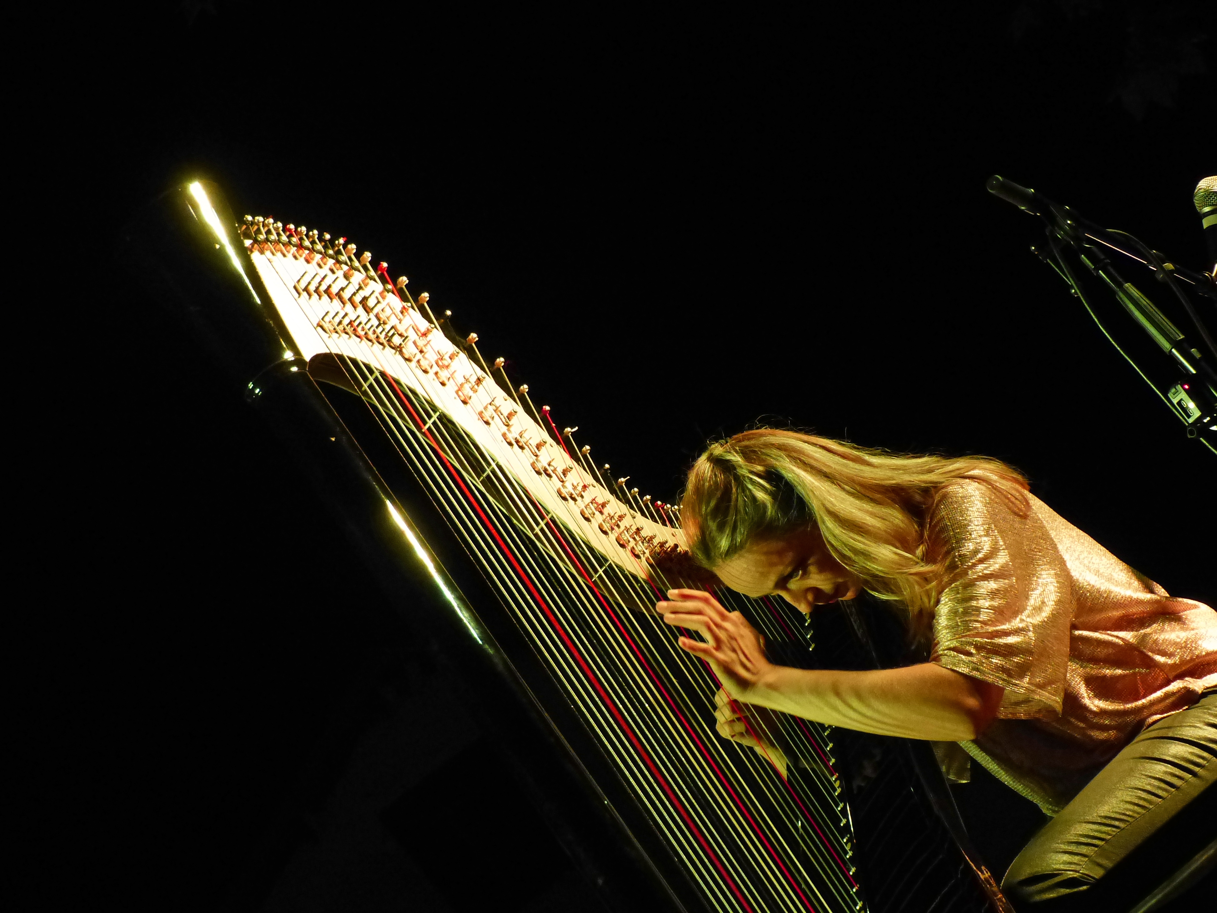 Rossitza Milevska en concert en France, en 2017.